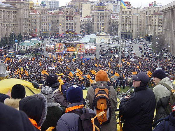 Foto gemaakt door Marion Duimel 22 nov 2004 in Kiev